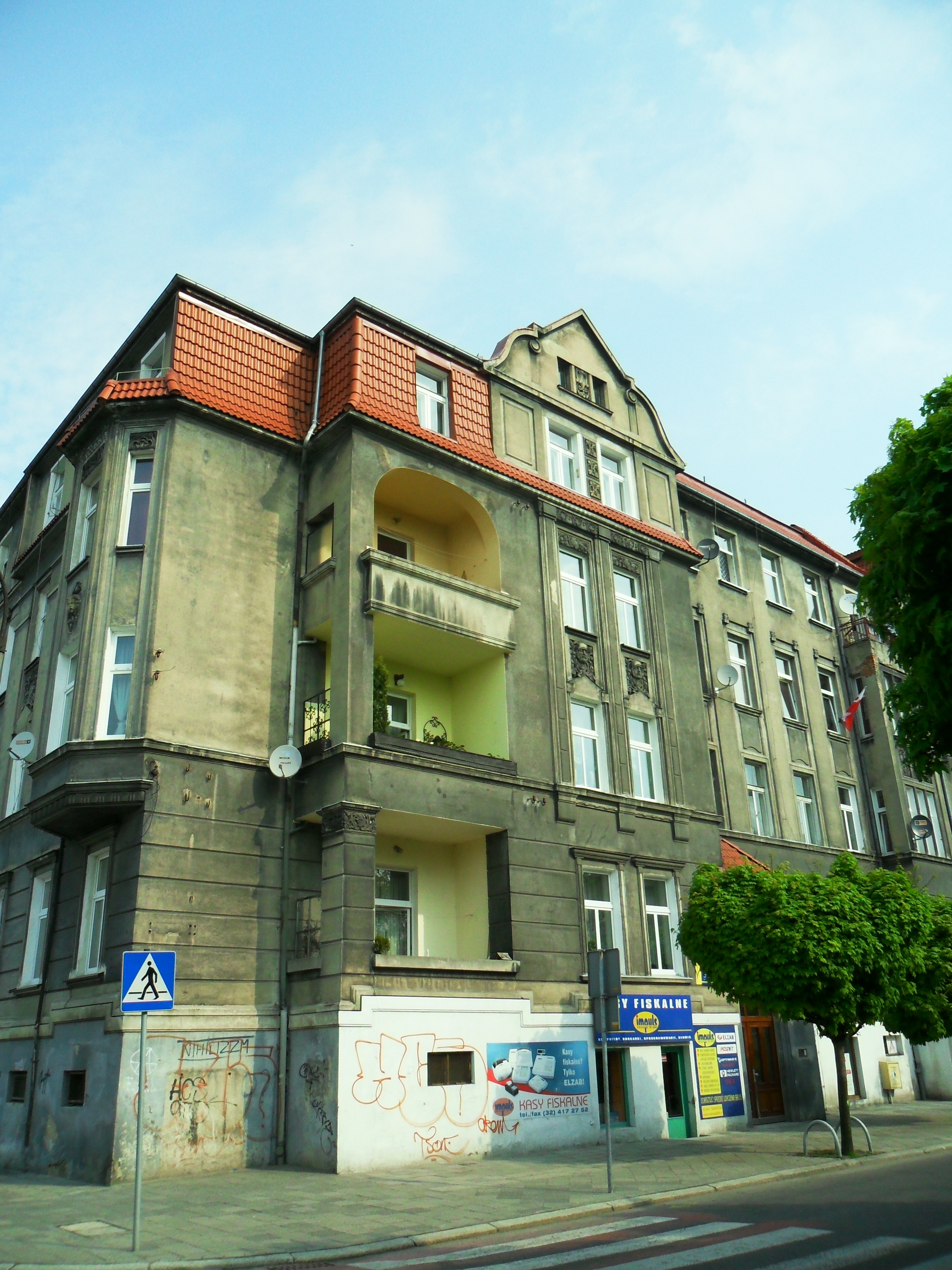 Kamienica przy ulicy Wileńskiej 21 w Raciborzu.